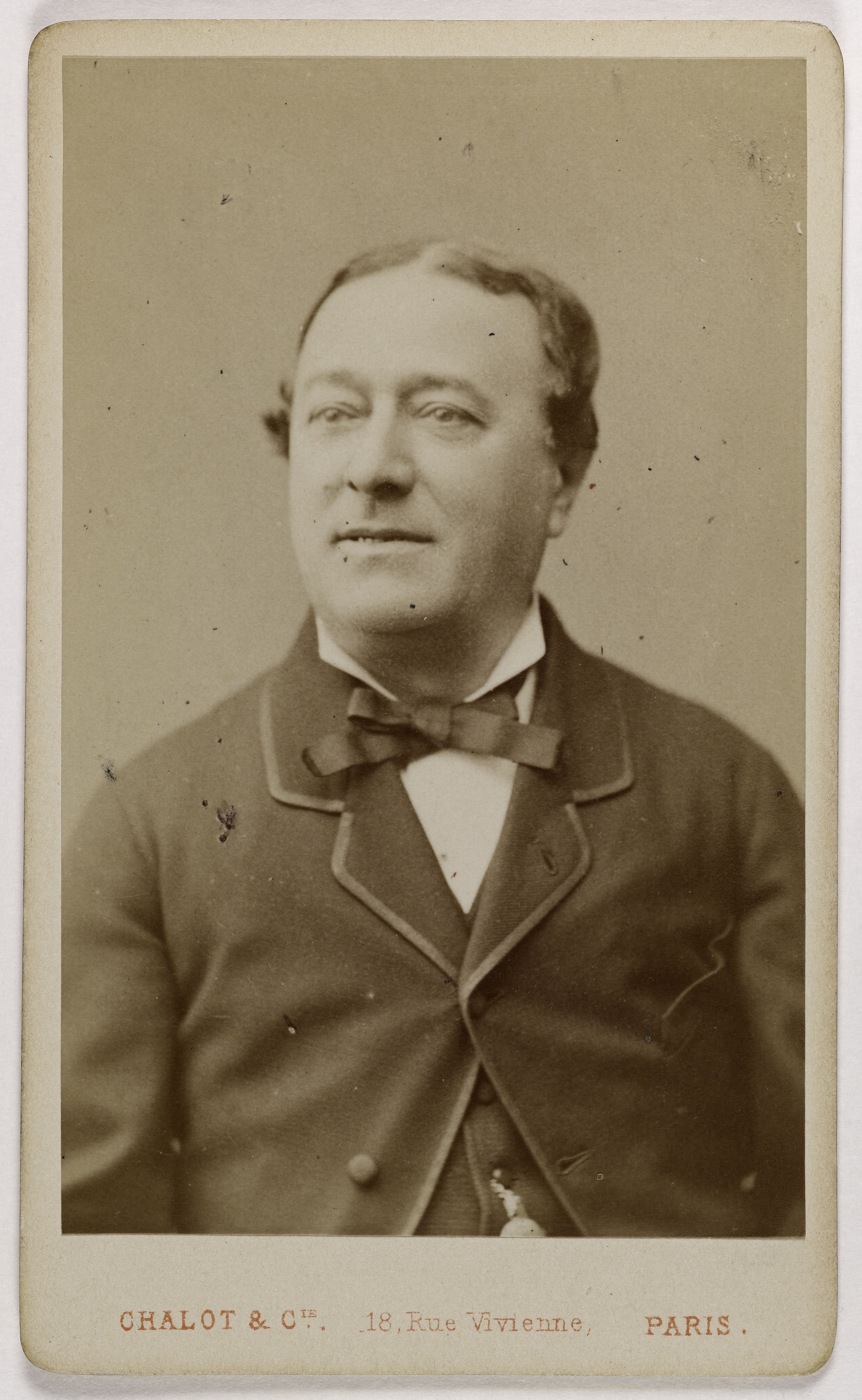 Chalot & Cie. Portrait de Paulin Louis Boisselot (1829-1905), (acteur). Carte de visite (recto). Tirage sur papier albuminé. 1870-1890. Paris, musée Carnavalet.